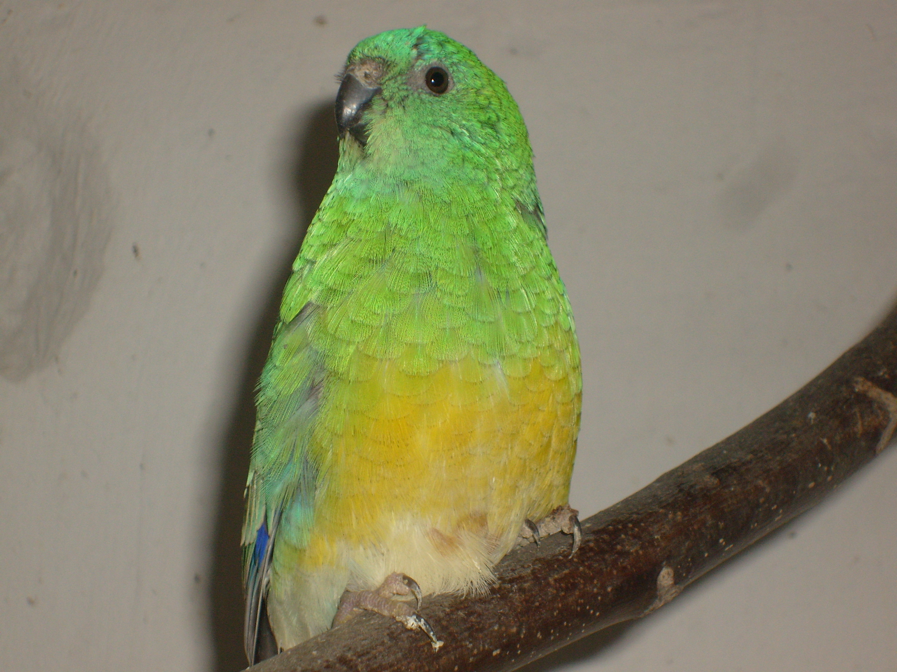 Énekes hím papagáj ül egy ágon a röpdéjében (Győr)